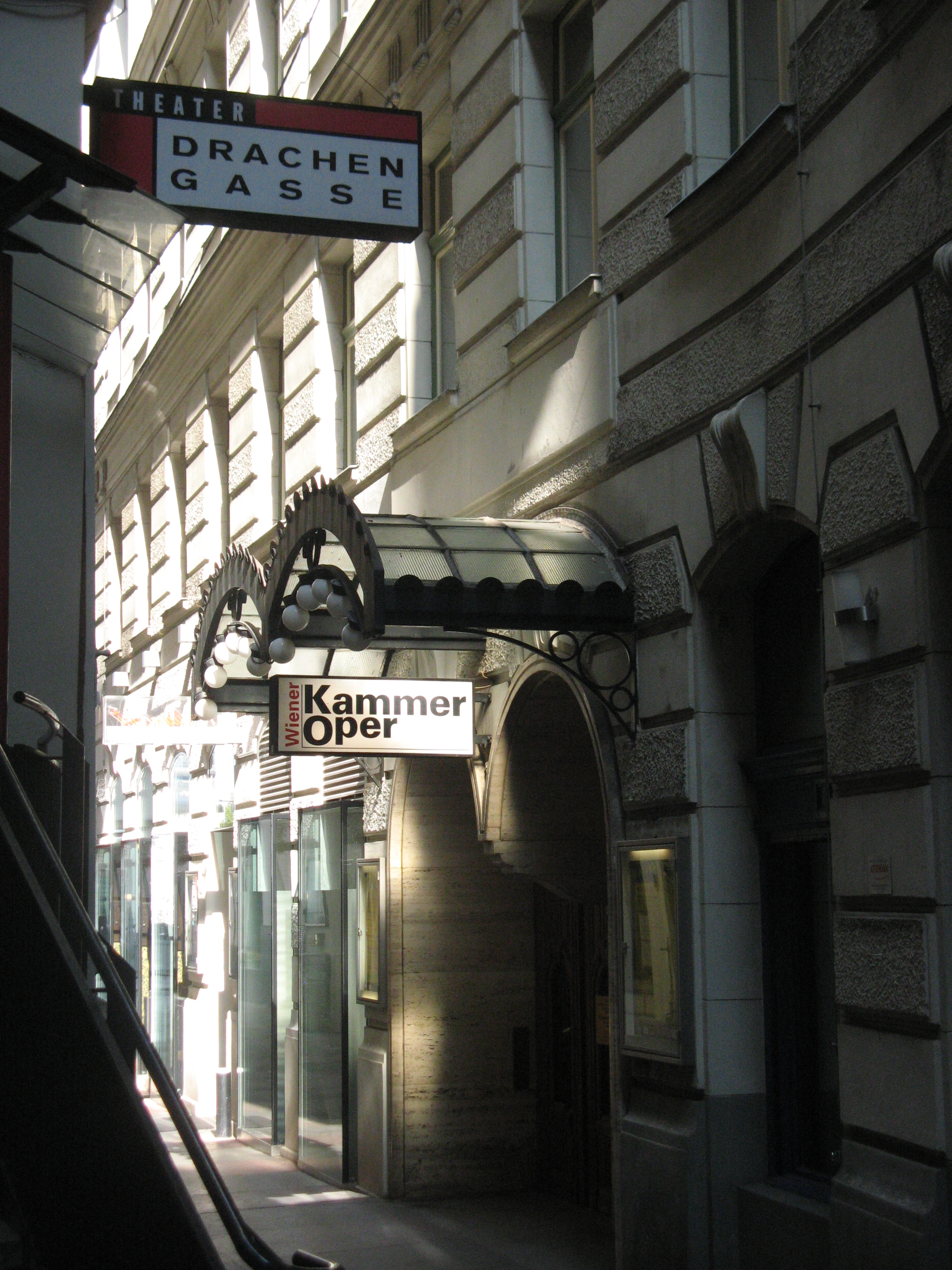 Theater Drachengasse, Wien-Innere Stadt